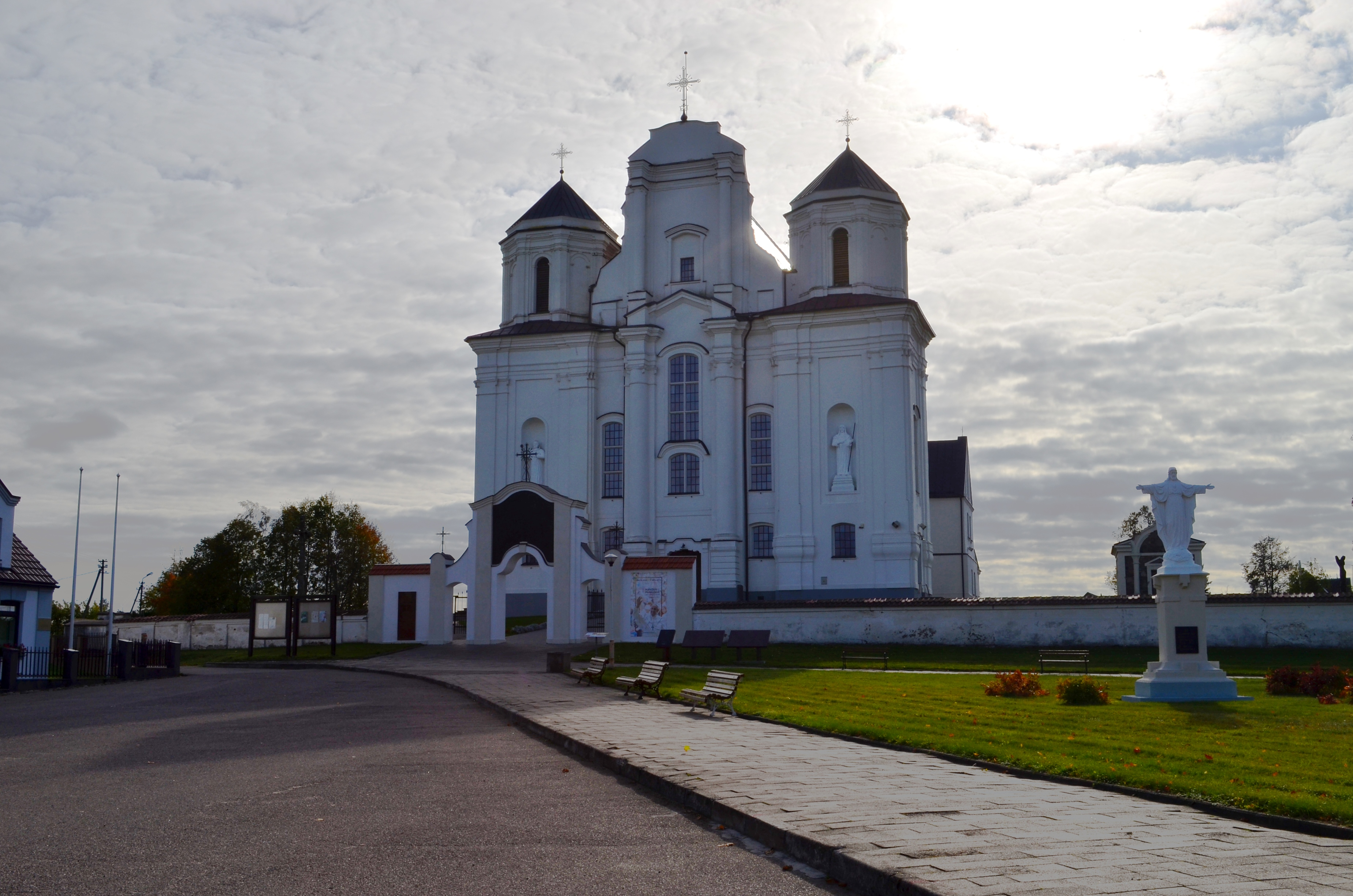 Kražių bažnyčia, Kelmės raj.